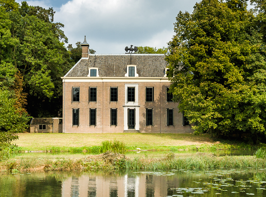 Achterzijde Landgoed Oud Amelisweerd